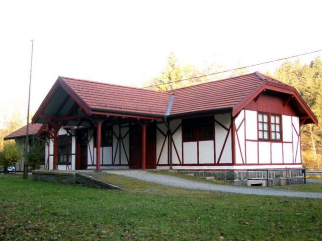 Das Gebäude des Bahnhofs "Lichtenberg Ofr." in Blechschmidtenhammer ist frisch renoviert. Es beherbergt ein Informationszentrum des Naturparks Frankenwald. Kernstück der Ausstellung ist ein Modell der Höllentalbahn im Maßstab HO. Das Bild ist im Oktober 2005 aufgenommen.